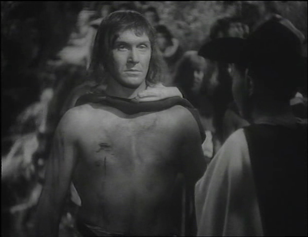 Screenshot del film La corona di ferro (1941) di Alessandro Blasetti.